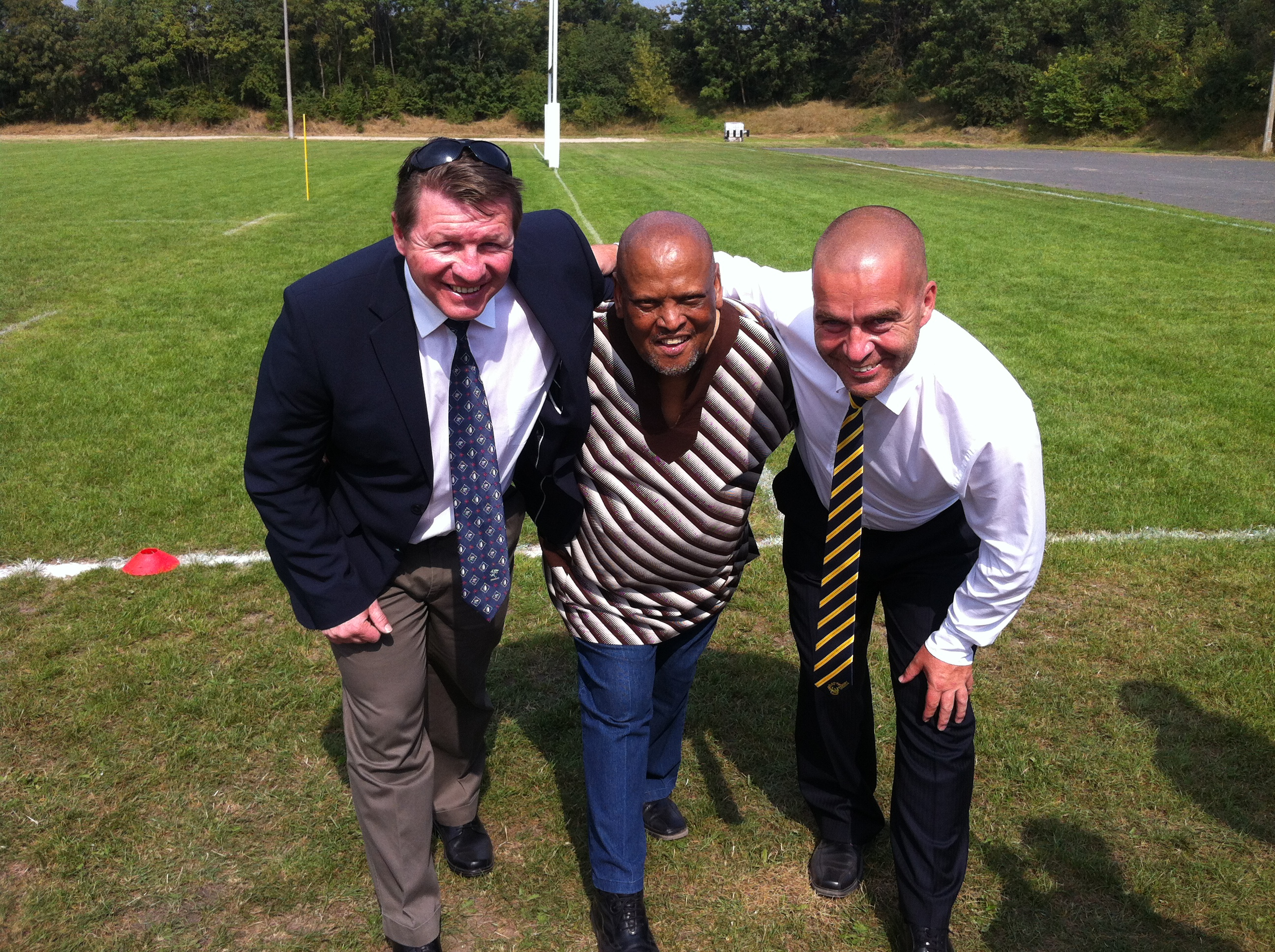 Hans Scriba, Botschafter Stofil, Karsten Heine (v.l.n.r.)